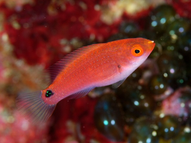 クロヘリイトヒキベラ Cirrhilabrus cyanopleura